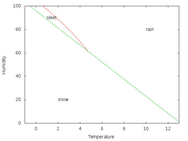 雪#cite_note-11で紹介している松本市のデータに基づく雨雪判別図。縦軸が湿度(%)、横軸が気温(℃)、でsnow(雪)/sleet(霙)/rain(雨)の3状態が区分されている。以下、雪#cite_note-11のコピー：大気中における雪片の融解現象に関する研究 気象研究所技術報告第8号、1984年3月。2章p.19-p.20に輪島、松本、日光各地のデータに基づく相対湿度と地上気温を軸にとった雨雪判別図が、同章p.15に回帰分析によって得られた近似式が掲載されている。上に挙げた二式はともに松本のもの。